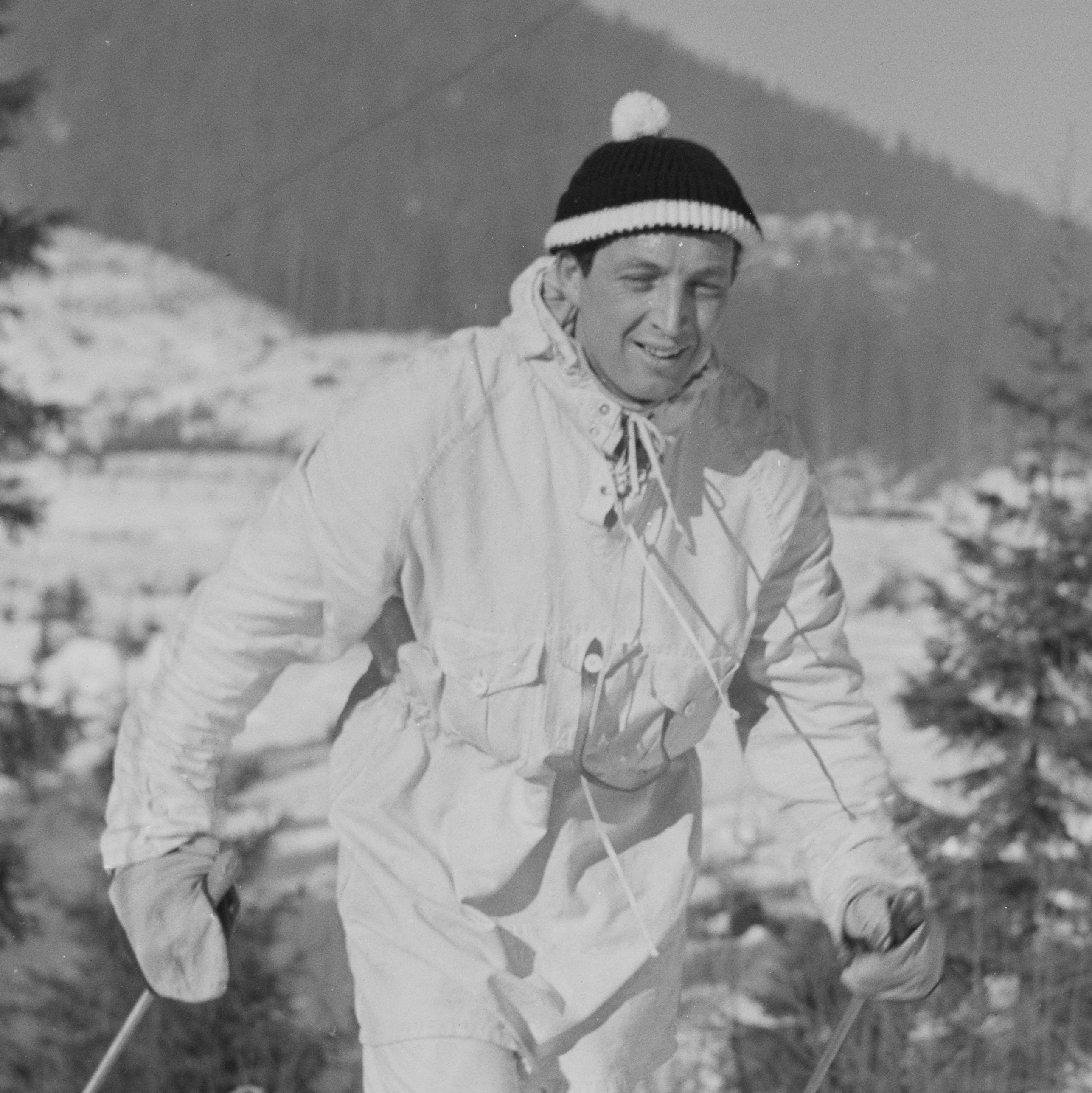 Bildet er hentet fra Arkivverket. Stortinget på ski NÅ nr. 9, 1955 Arkivinstitusjon : Riksarkivet Arkivnavn : Billedbladet NÅ Sted : Norge, Ukjent, Ukjent, Ukjent Emneord: Ski, Menn, Vinter, Snø Avbildet: Kristian Asdahl